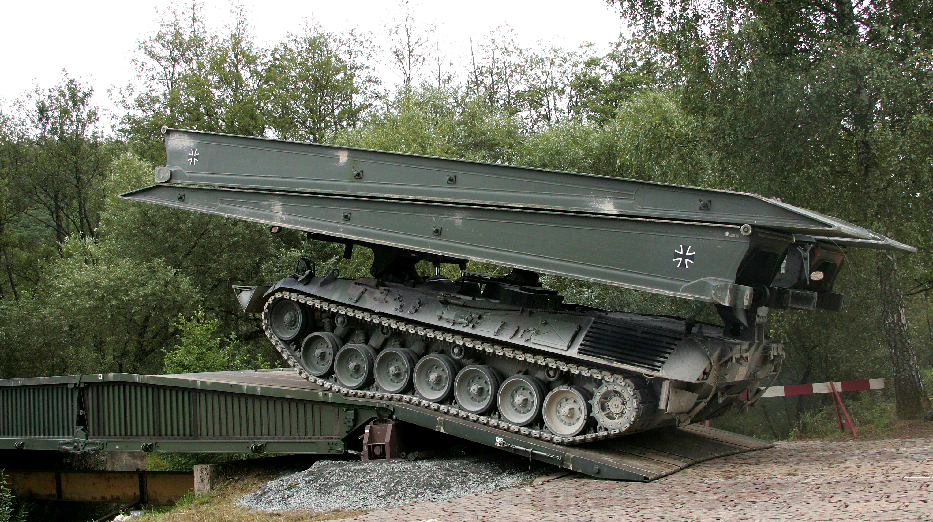 Transport einer Panzerschnellbrücke Biber über eine bereits installierte Faltfestbrücke auf dem Truppenübungsplatz Grafenwöhr. ©Bundeswehr/S.Wilke